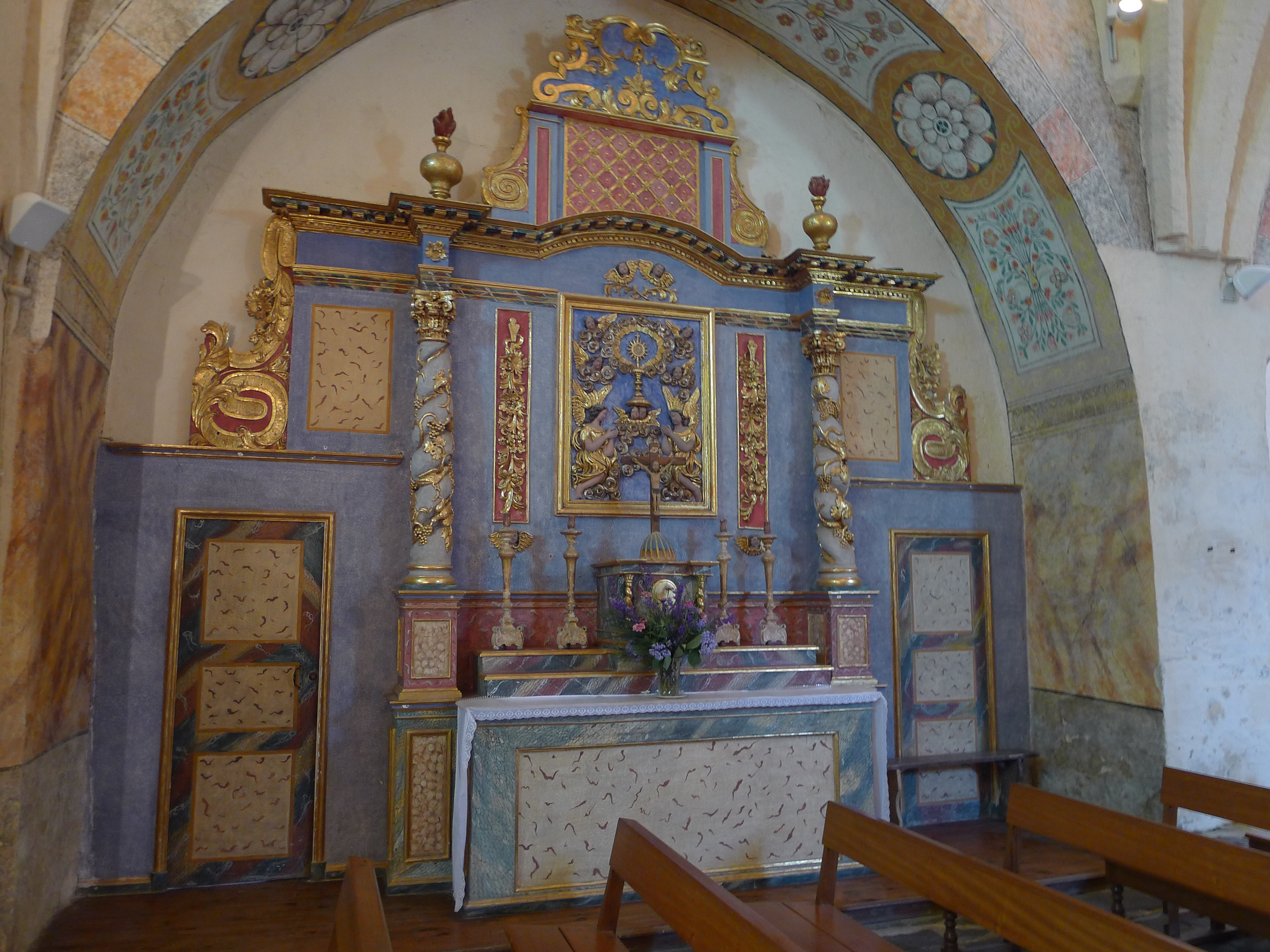 Retable de l'église de Montaner situé sur le côté droit de la nef